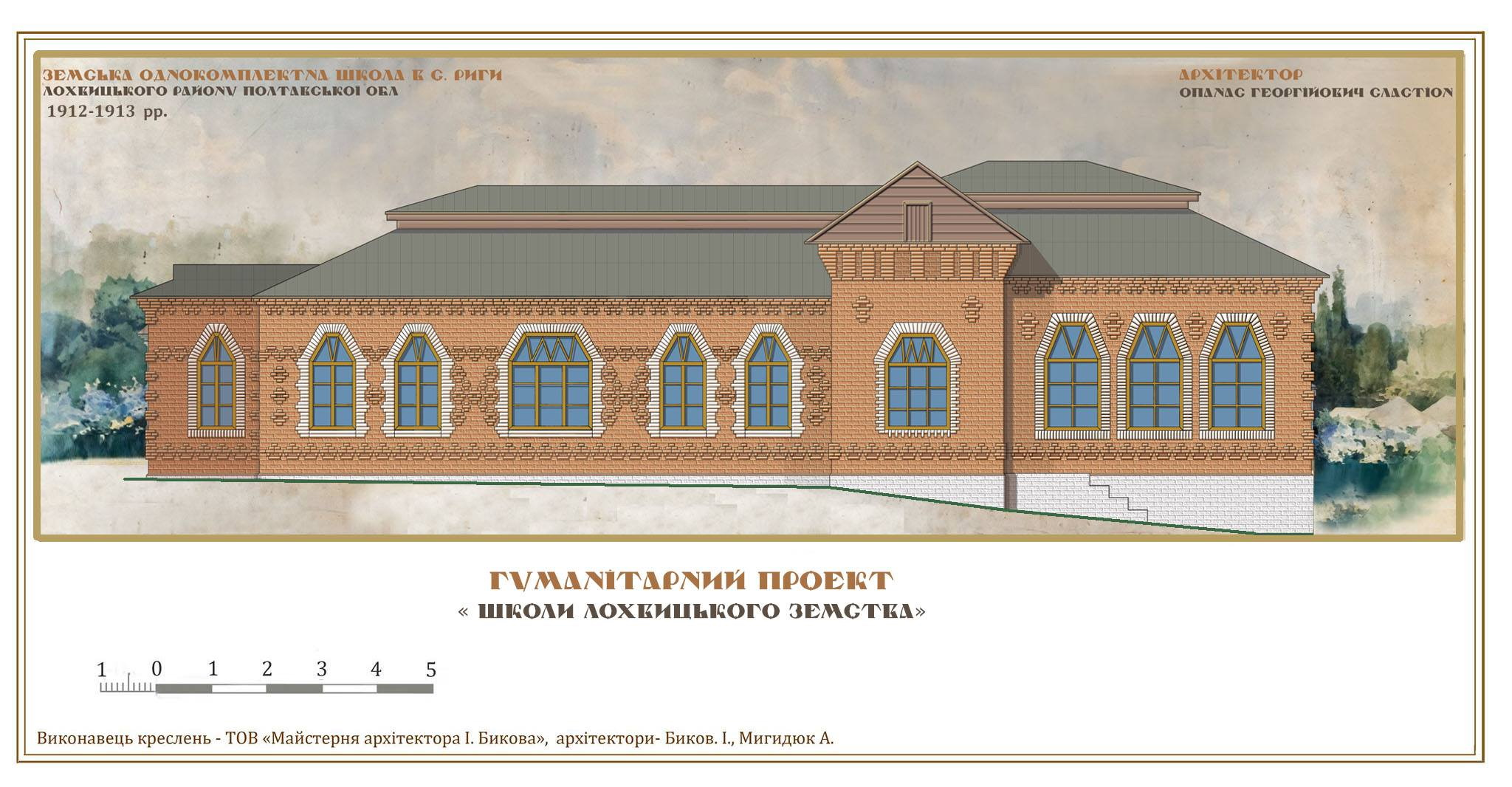 Земська школа в селі Риги, збудована у 1912-13 рр. Лохвицьким земством за проектом Опанаса Сластіона. Фасади будівлі прикрашені цегляним орнаментом за мотивами українських рушників. Мала декоративну башту, втрачену у часи СРСР. Фасад виконана архітектор-реставратор Мигидюк А.С. ( ТОВ "Майстерня архітектора І. Бикова")